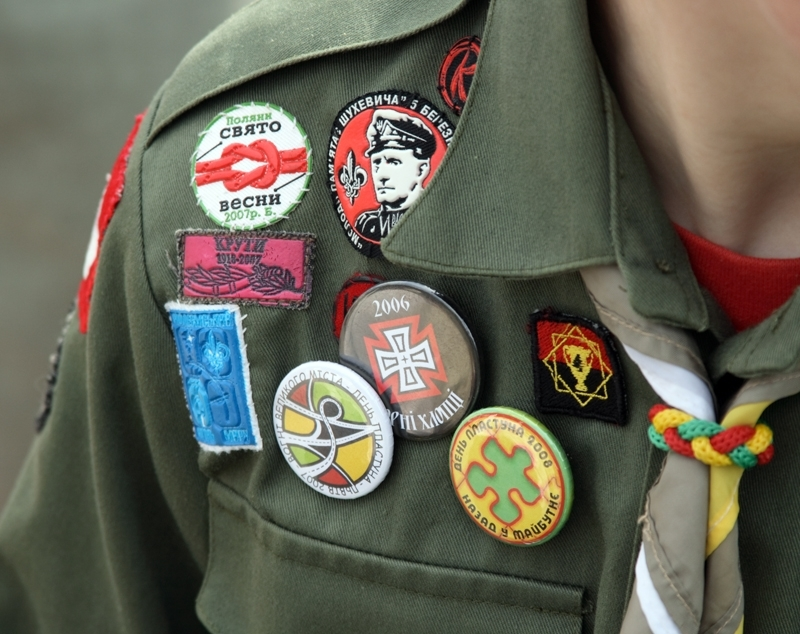 Пластун с символикой